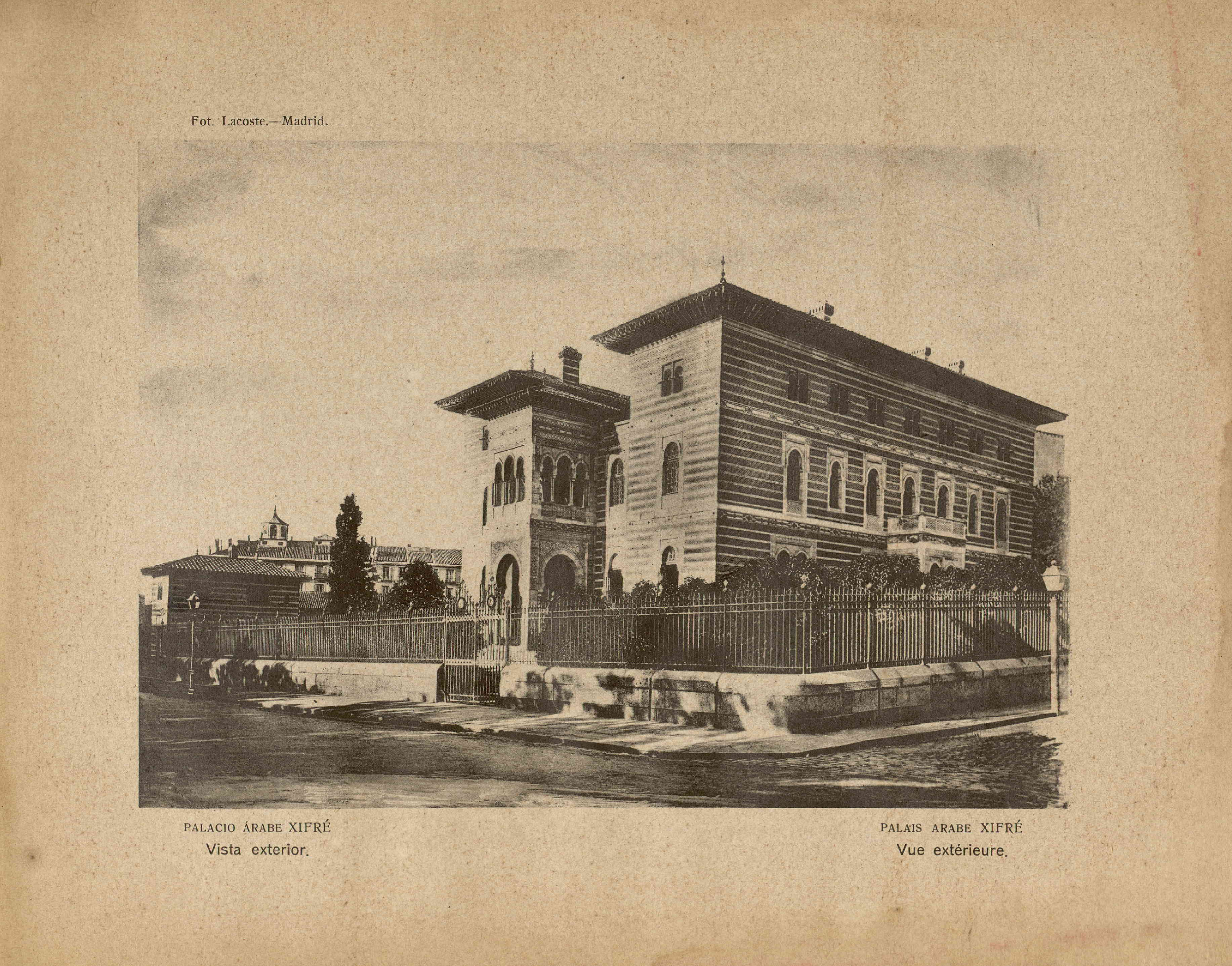 Fotografía del Palacio Xifré de Madrid en alguna fecha indeterminada del siglo XIX